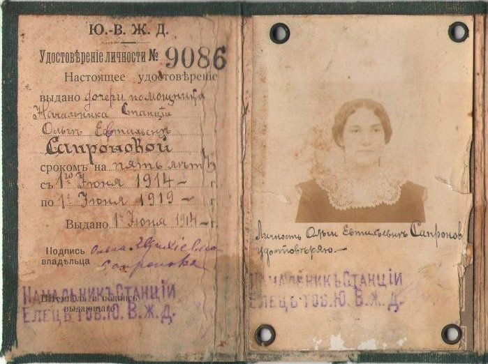 Проездной билет ЮВЖД